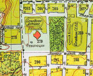 Троицкий собор (выделен красным) на плане Томска 1933 года. Собор уже закрыт, но ещё существует.